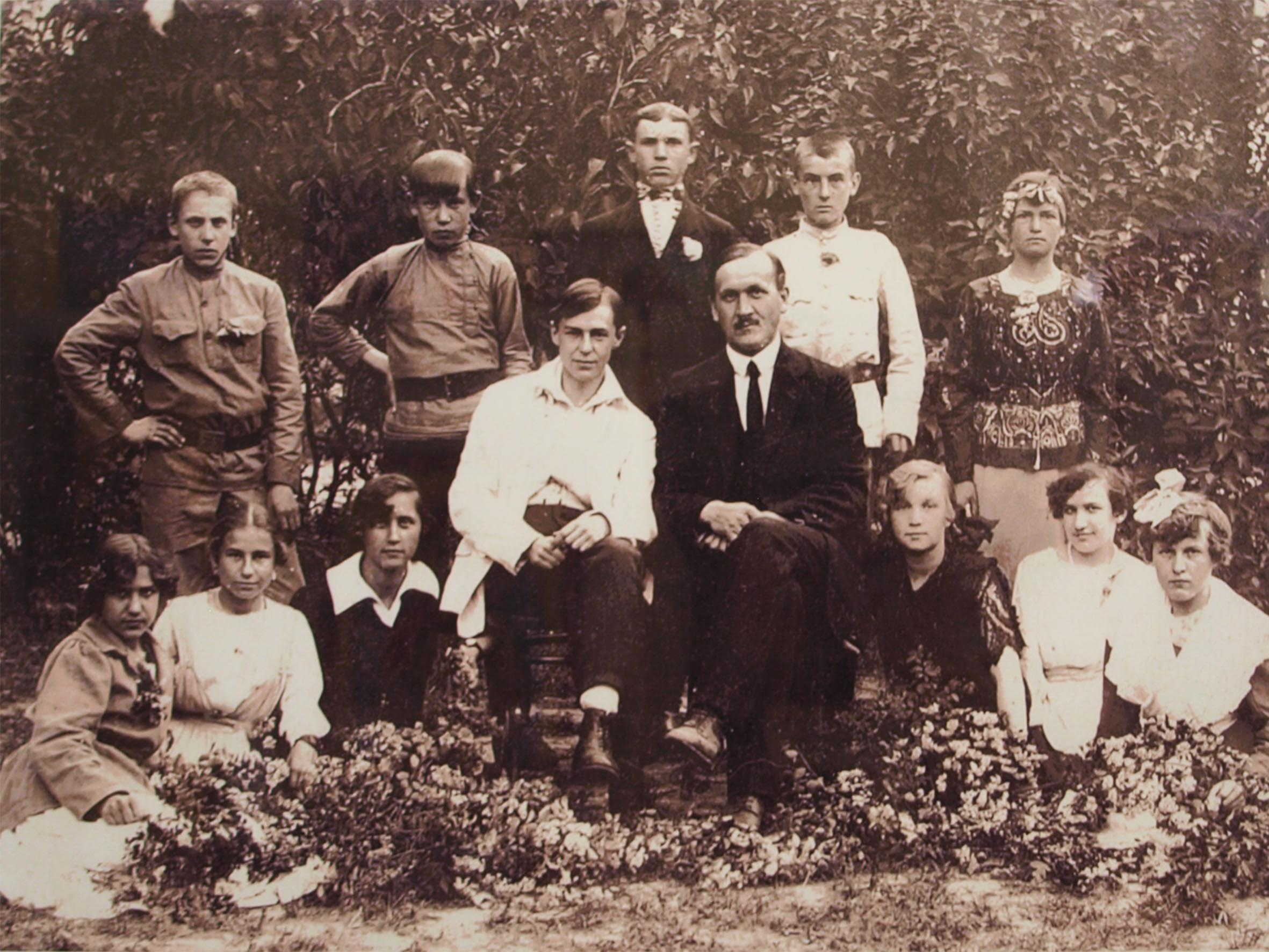 В. Підмогильний (у центрі зліва) й учні ворзельського школи, 1921